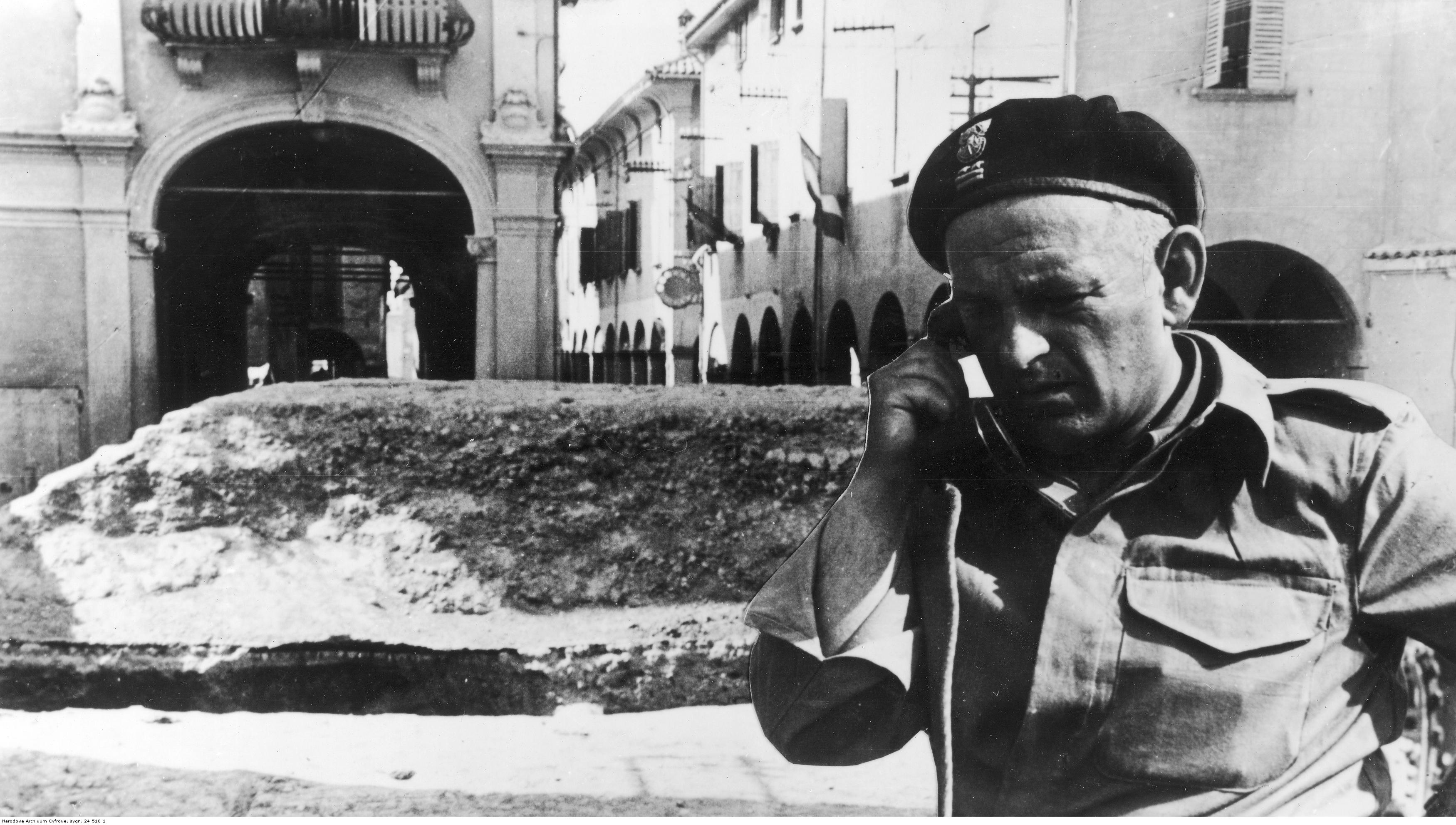 Zdobycie Mediciny przez żołnierzy 2 Korpusu Polskiego podczas walk o Bolonię. Ppłk Feliks Motyka, dowódca 6 Pułku Pancernego "Dzieci Lwowskich", w zdobytej Medicinie. Archiwum Fotograficzne Tadeusza Szumańskiego. Sygnatura: 24-510-1